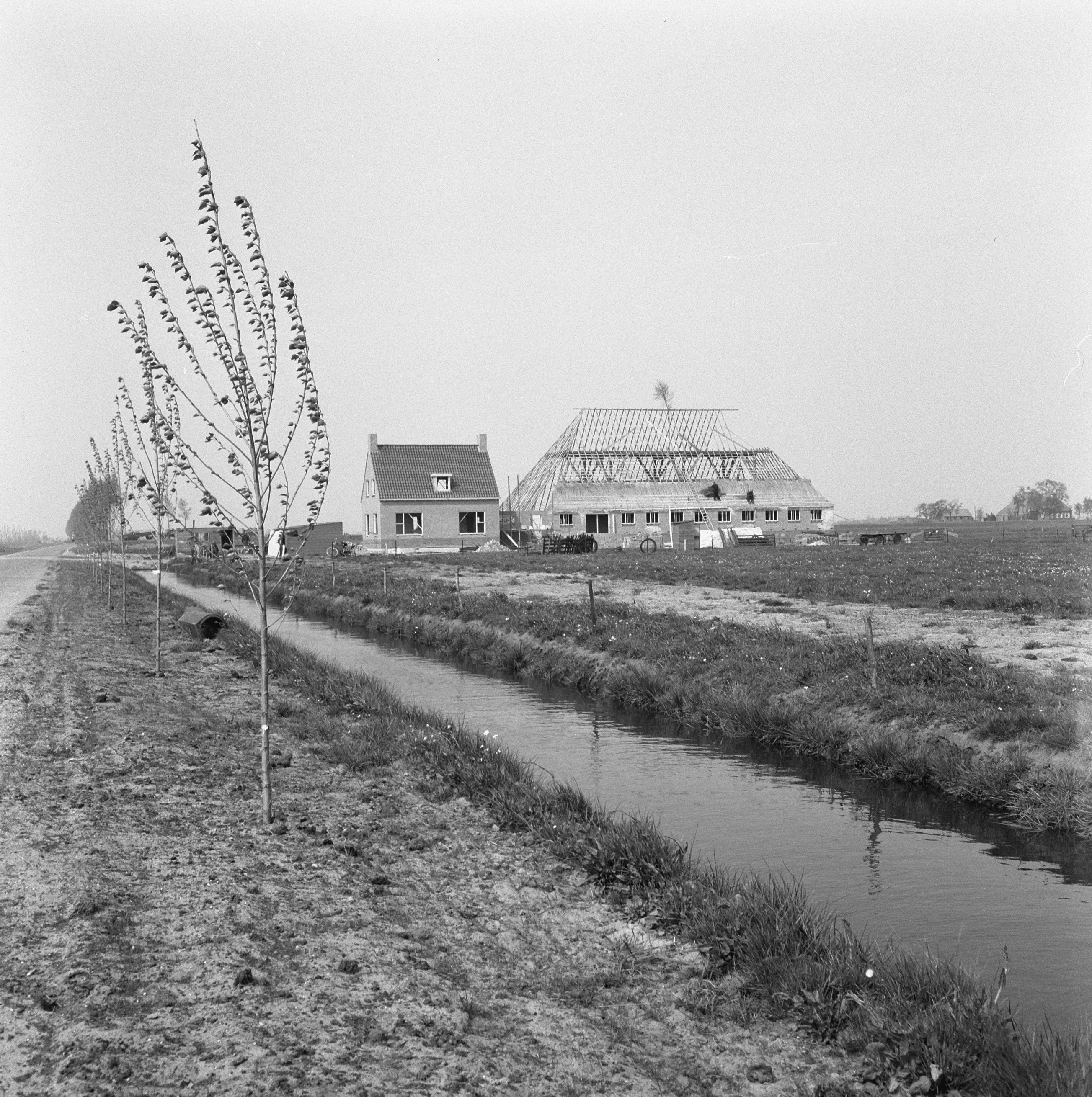 Collectie / Archief : Fotocollectie Nederlandse Heidemaatschappij Reportage / Serie : [ onbekend ] Beschrijving : gebouwen, boerderijen, ruilverkavelingen, Haskerveenpolder Datum : mei 1960 Locatie : Haskerveenpolder Trefwoorden : boerderijen, gebouwen, ruilverkavelingen Fotograaf : Fotograaf Onbekend / Heidemij Auteursrechthebbende : Nationaal Archief Materiaalsoort : Negatief (zwart/wit) Nummer archiefinventaris : bekijk toegang 2.24.06.02 Bestanddeelnummer : 163-0224